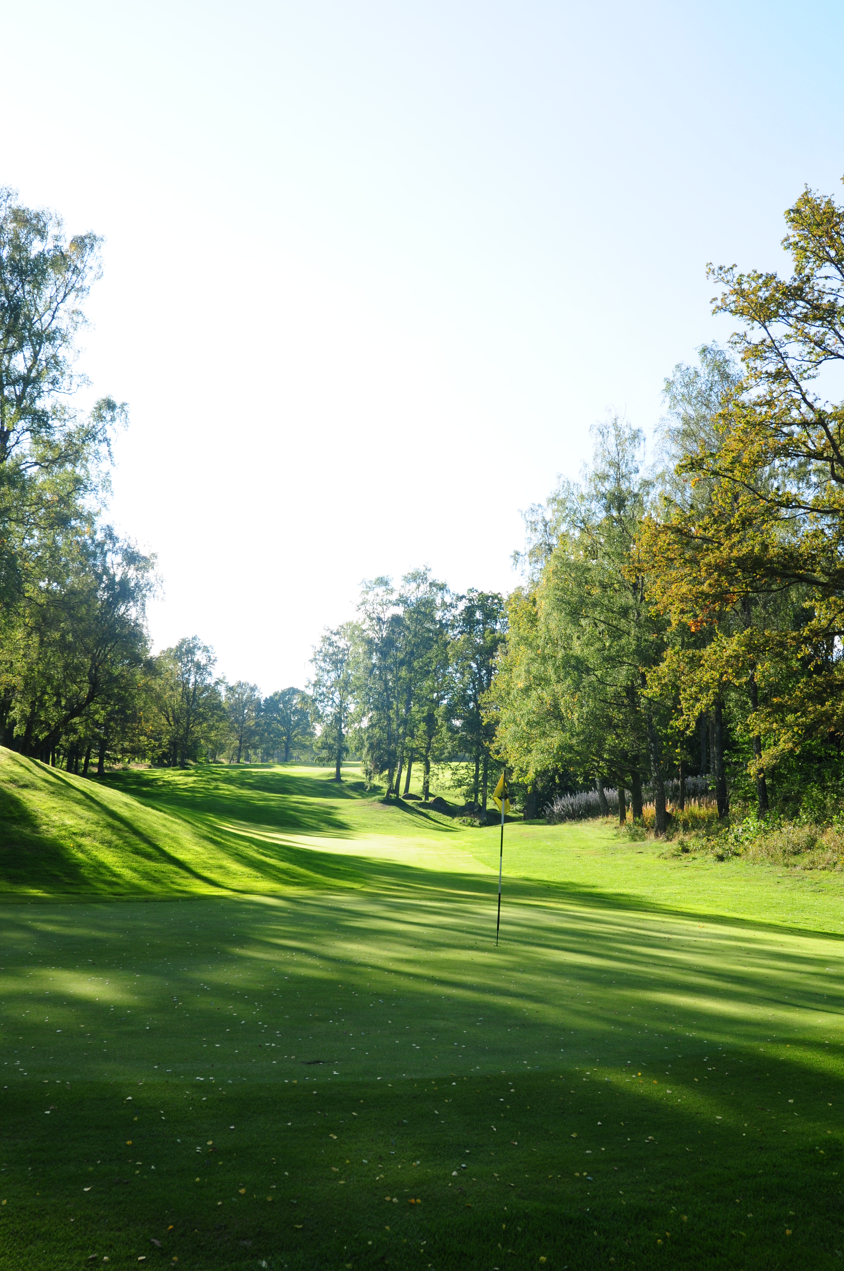 Gul 2, ett av Hökensås GKs signaturhål